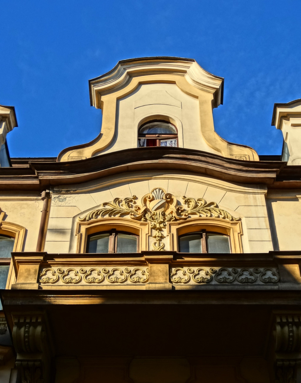 Kamienica przy ul. Cieszkowskiego 17 w Bydgoszczy (1897-1898, Józef Święcicki)